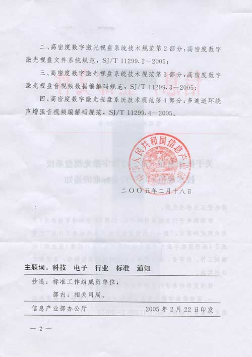 中國信息產業部發佈《高密度數字雷射視盤系統技術規範》電子行業標準通知。 來源：北京阜國數字技術有限公司官方網站。